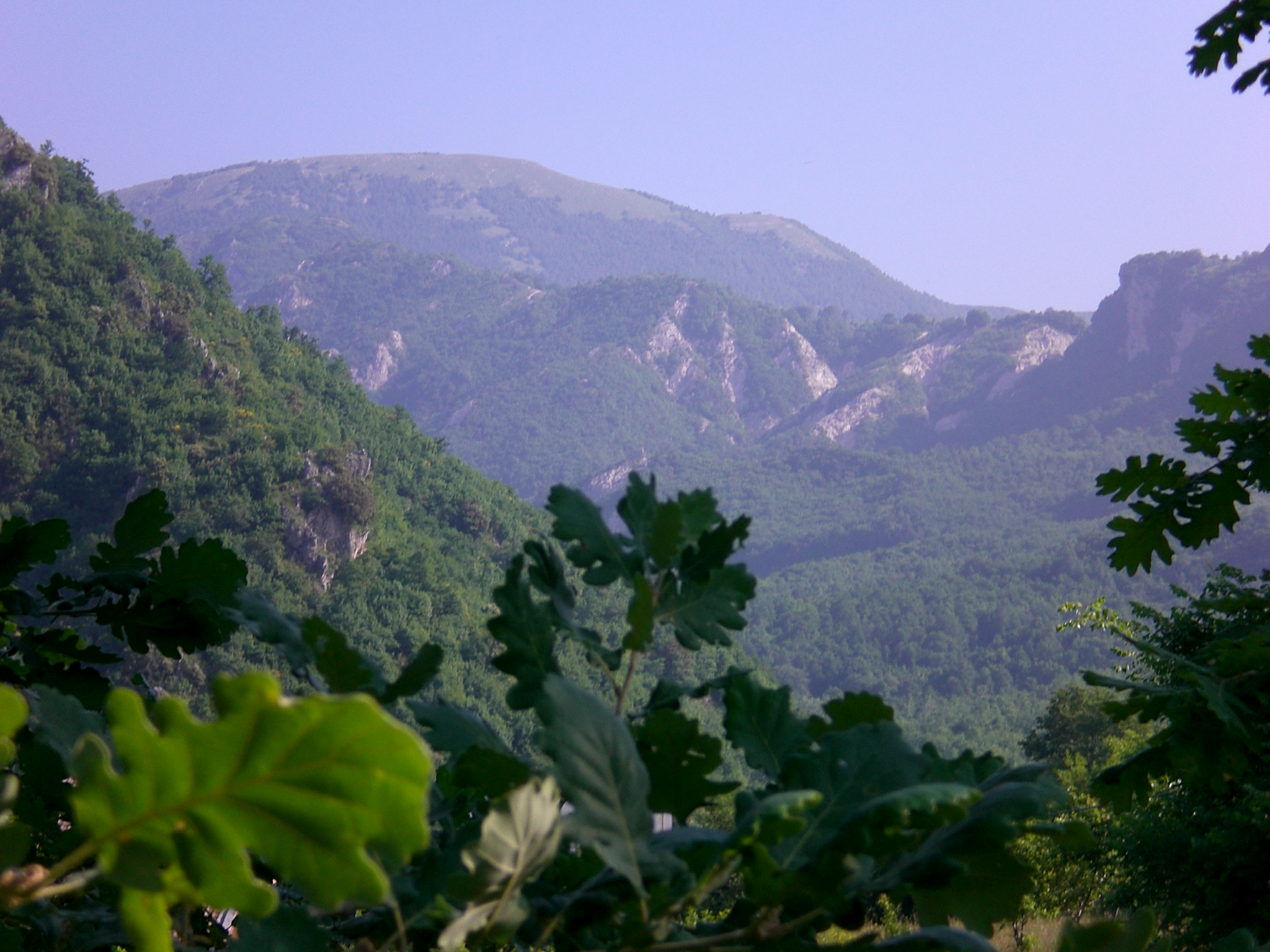 Monte Polveracchio e valle del Tenza, Campagna, Province of Salerno, Italy.